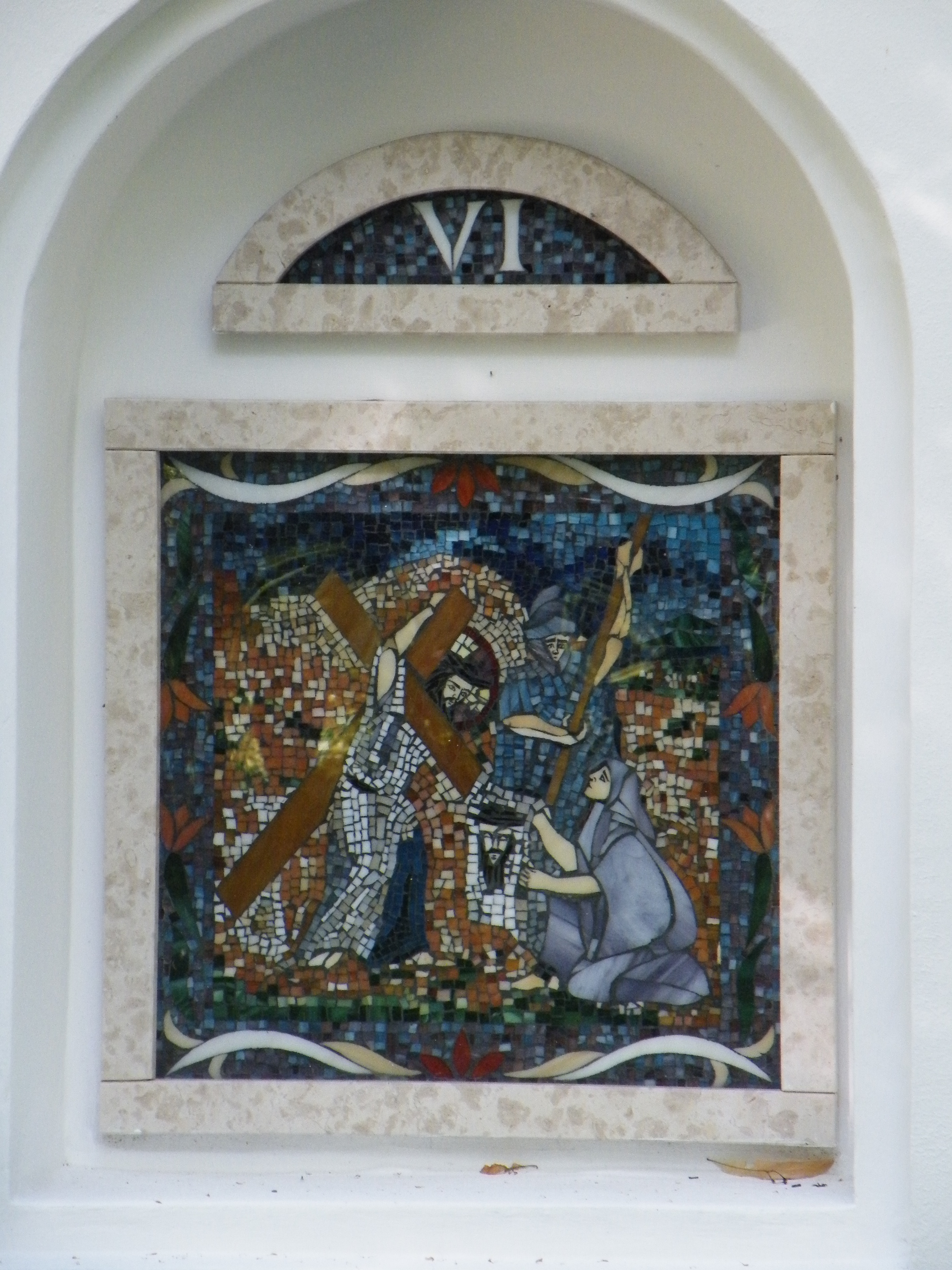 Stációk a Palóc ligetben, Balassagyarmaton